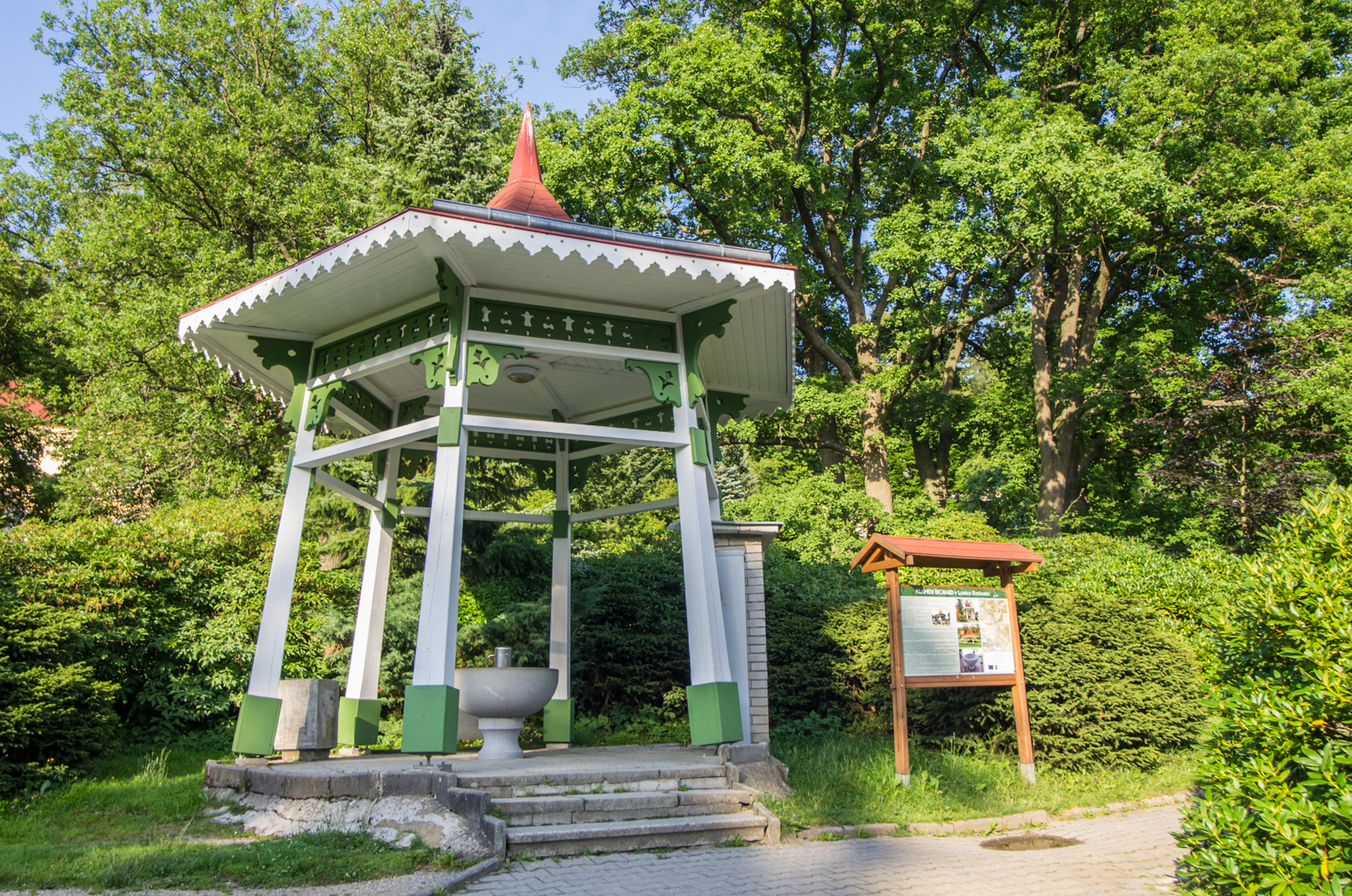 Lázně Kynžvart, minerální pramen Richard, okres Cheb